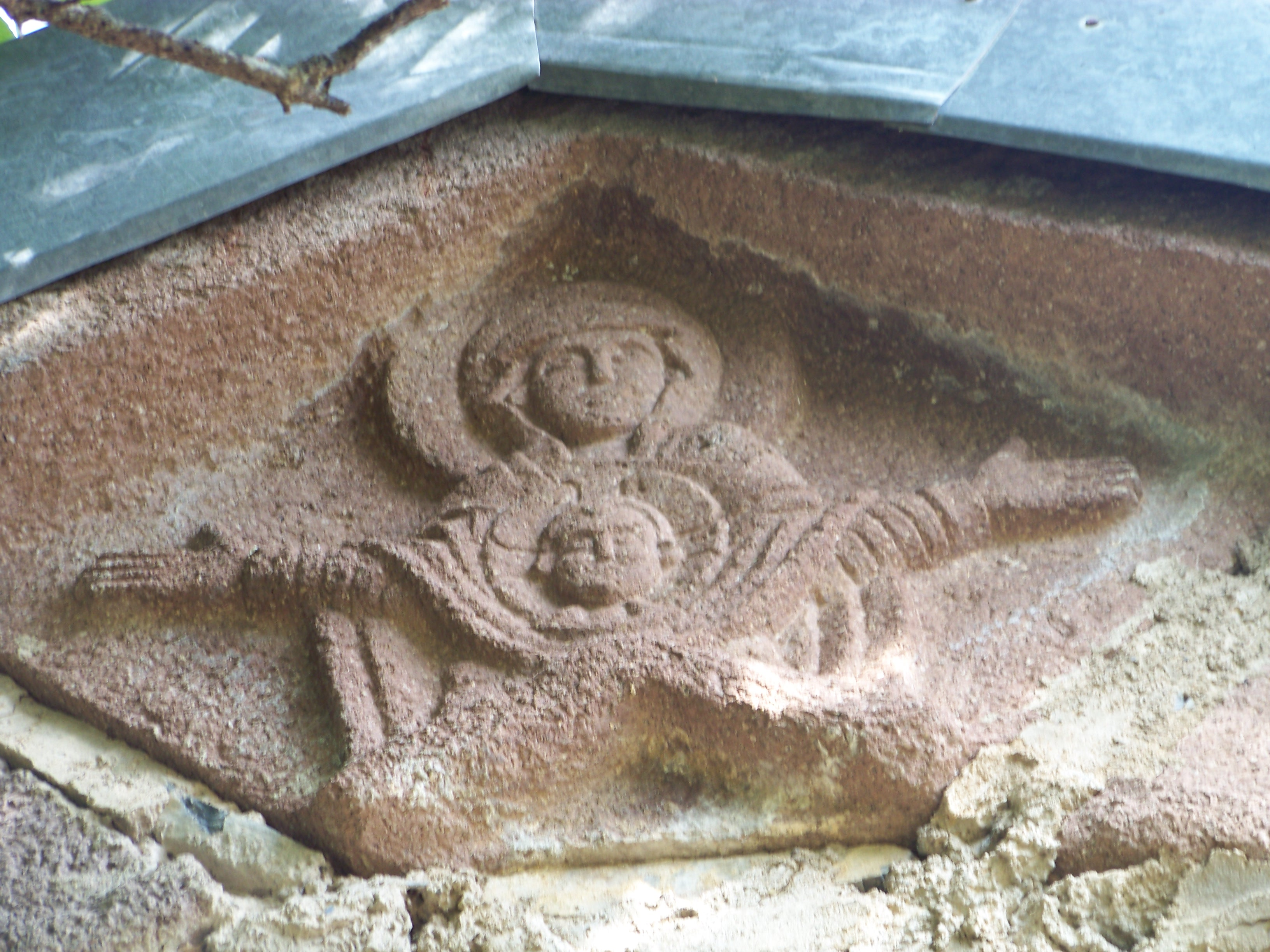 ღვთისმშობლის დარბაზული ეკლესია